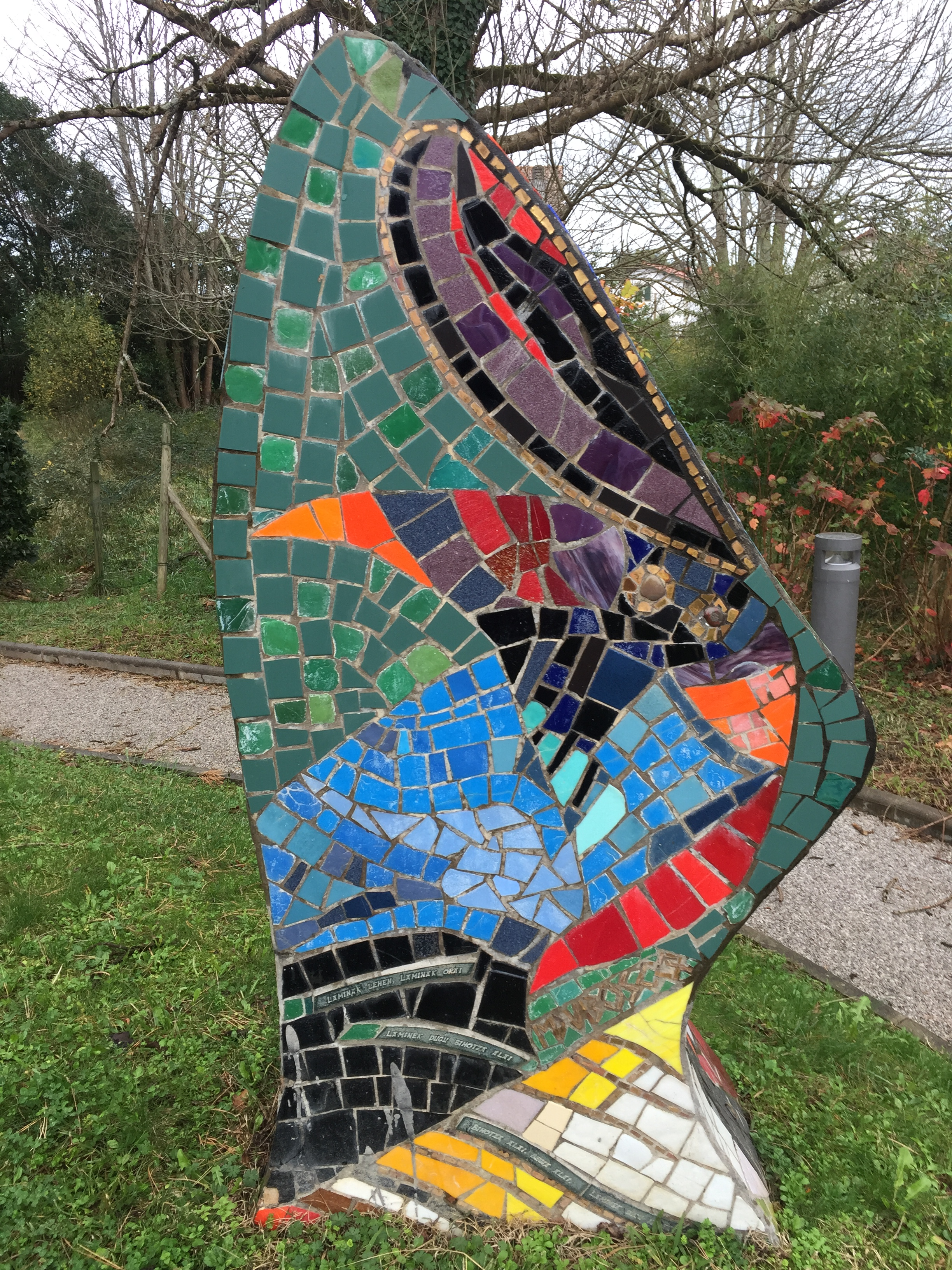 Michel Duboscq-en eskulturak Getariako Saralegienea etxean. Testua:"Laminak lehen laminak orai, Laminek dugu bihotza alai. Bihotza Alai, begia alai. Laminek dugu bihotza alai"